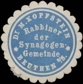 Sealing stamp Title: Dr. Max (Markus) Kopfstein Rabbiner Description: der Synagogengemeinde Beuthen/Schlesien, blau, weiß, geprägt, Judaika Place: Beuthen size: 3 cm